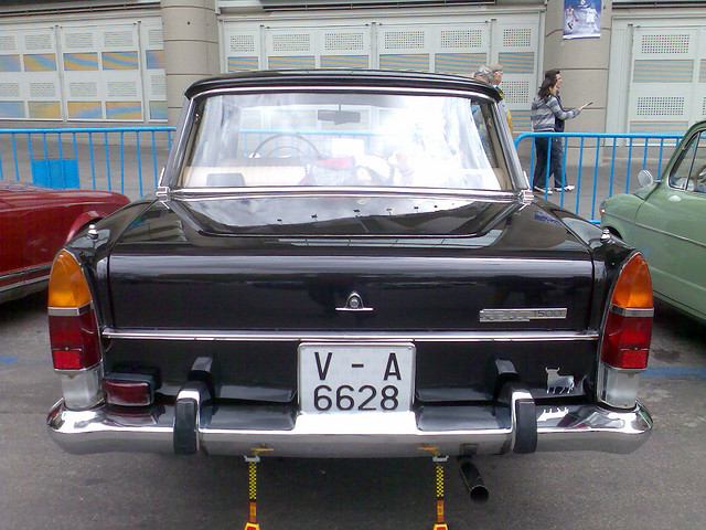 PININFARINA. PININfARINA pininFarina PiNiNfaRiNa PinINfaRIna . Un Valenciano en Madrid. Seat finales 60 en el Bernabeu MAD 5MAD155